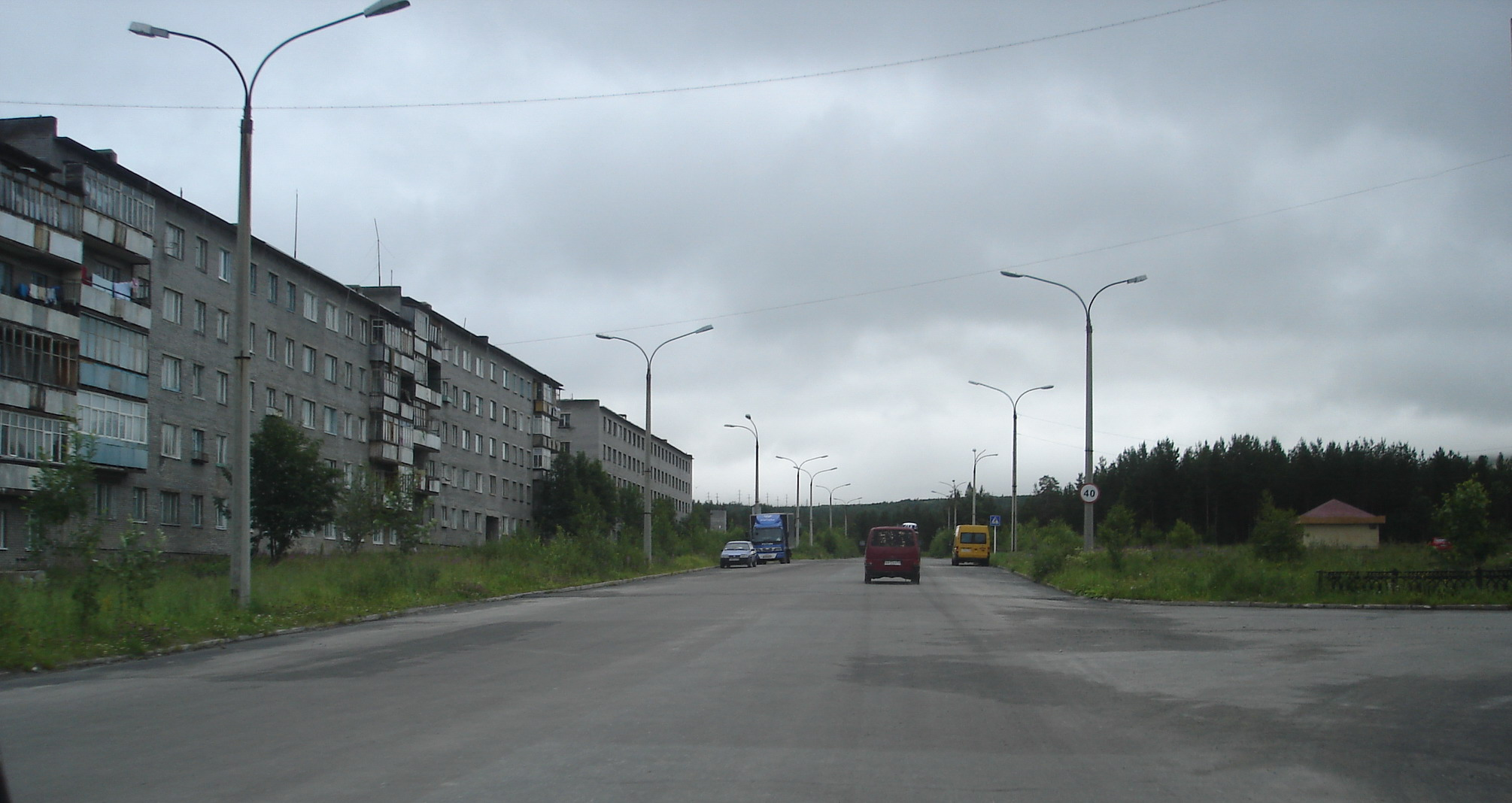 Ревда